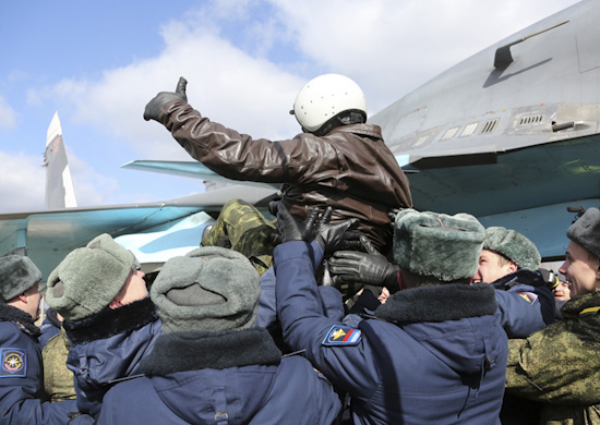 Возвращение российских военных лётчиков с авиабазы Хмеймим в Сирии на авиабазу Батурлиновка Западного военного округа в Воронежской области